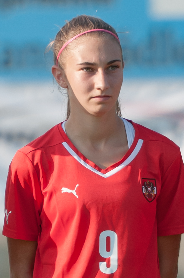 Frauenfußball U19 Testspiel Österreich - Norwegen am 12. August 2015 in Bad Erlach: Katharina Naschenweng